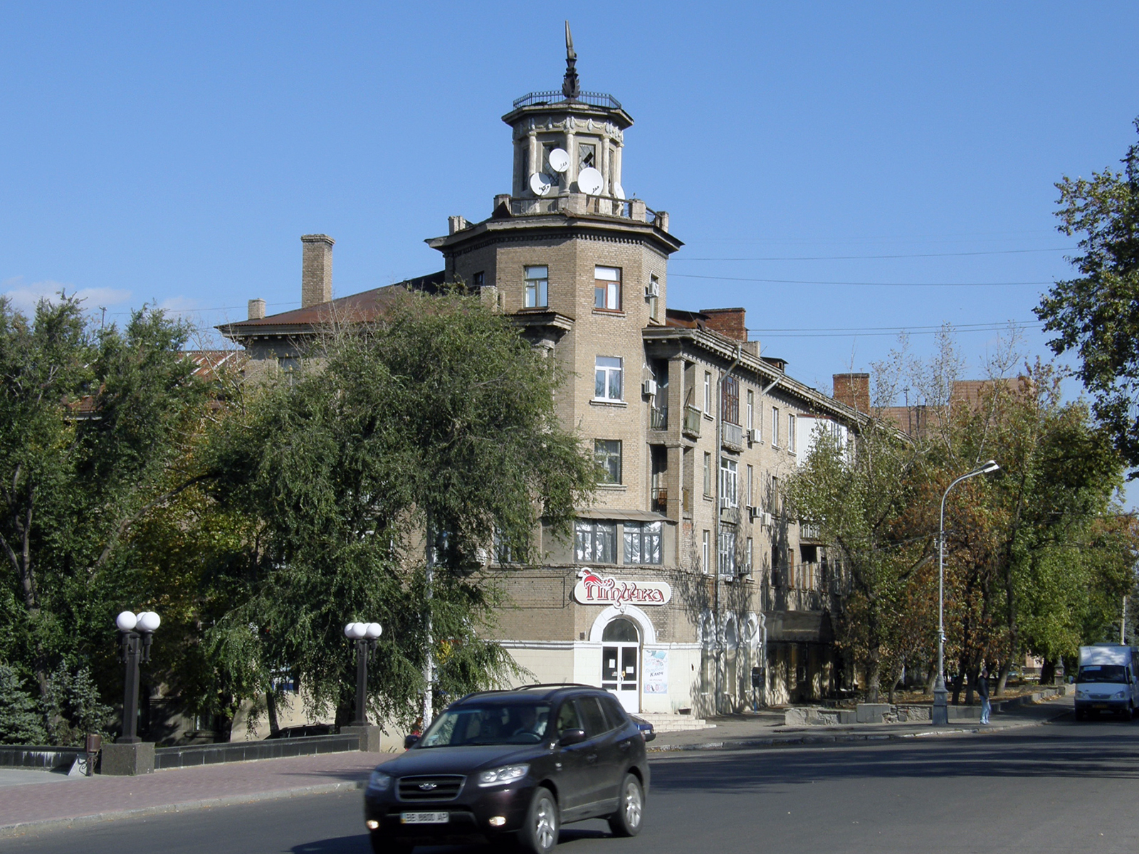 ул. Октябрьская, 2, Луганск